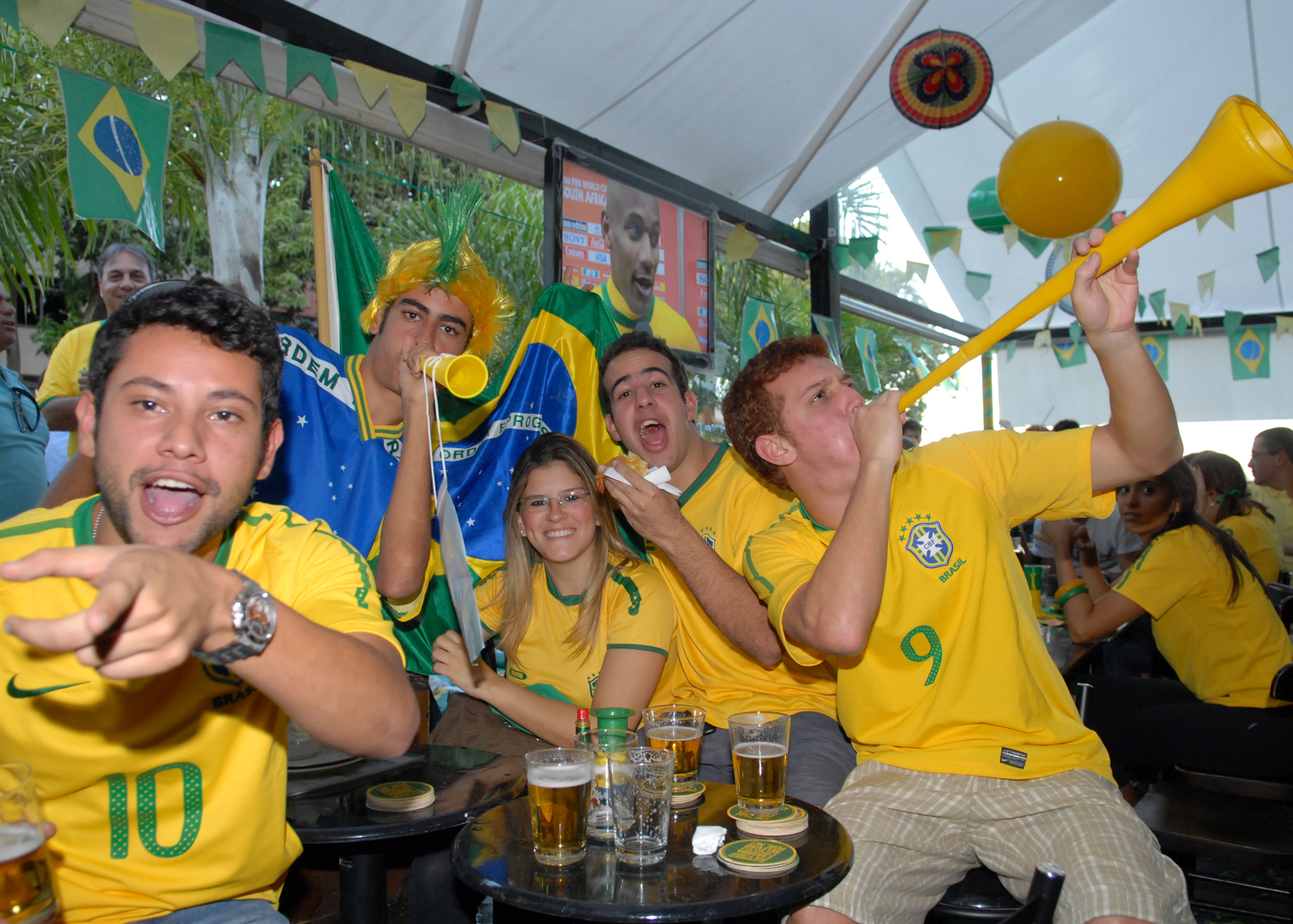 Brasília - Torcedores festejam a vitória do Brasil na estreia da Copa do Mundo